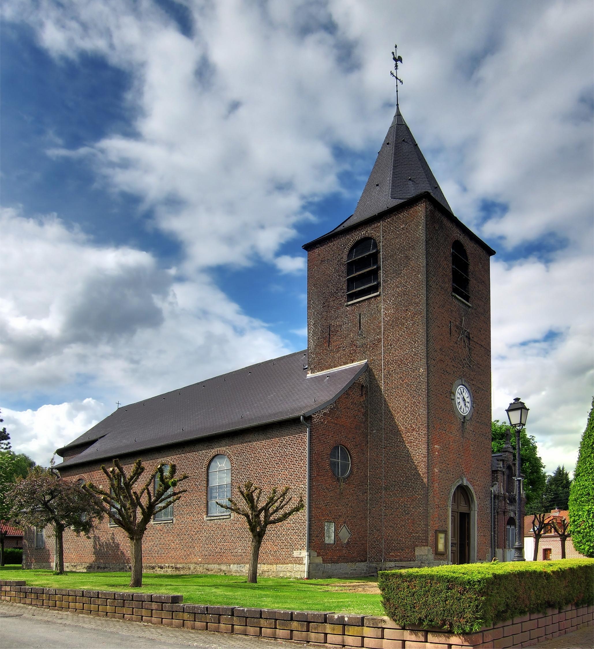 L'église Saint-Pierre de Sailly-lez-Lannoy.